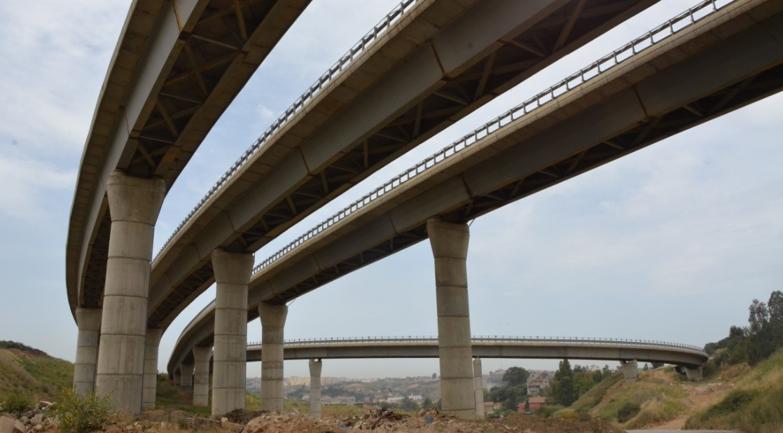 Viaduc de Berrahmoune sur la 2e rocade sud d'Alger